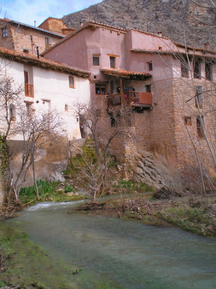 Río Guadalope a su paso por la localidad de Miravete de la Sierra, Teruel.